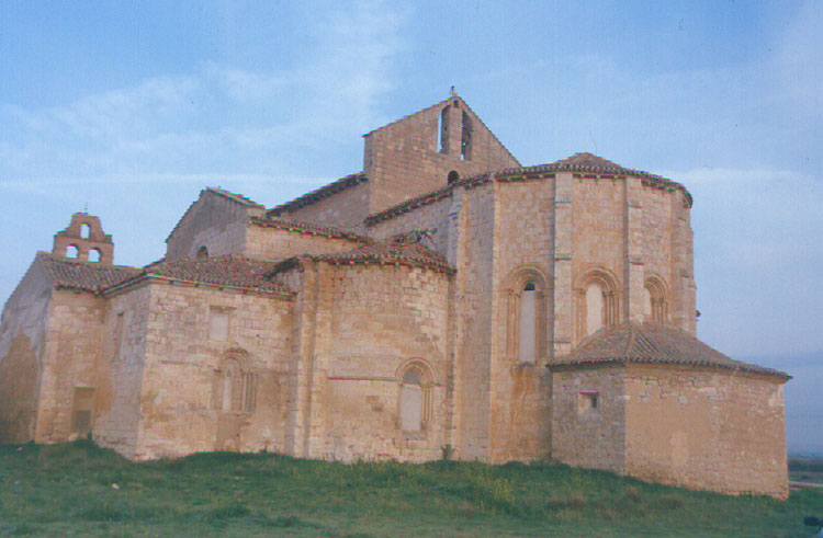 Monasterio de Santa María de Palazuelos - Cabezón de Pisuerga (Valladolid) - Diapositiva 48 x 48 Color